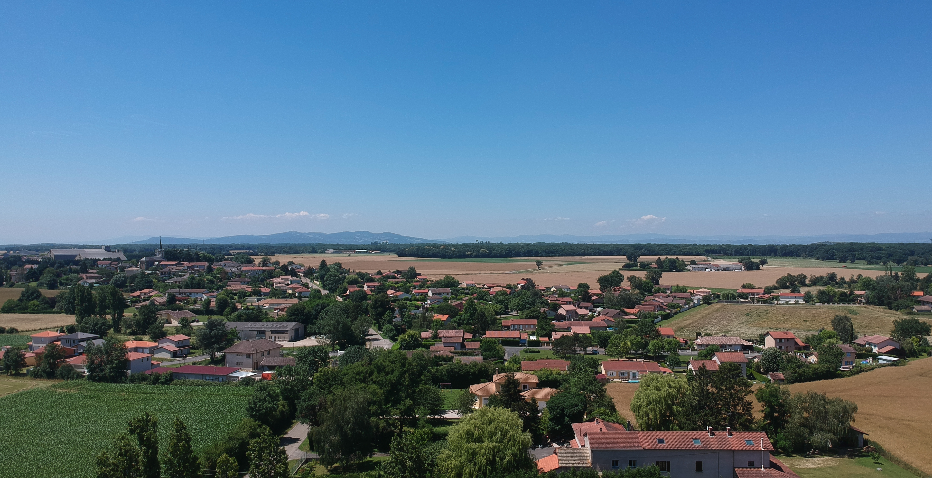 Vue aérienne de Saint-André-de-Corcy en 2018.